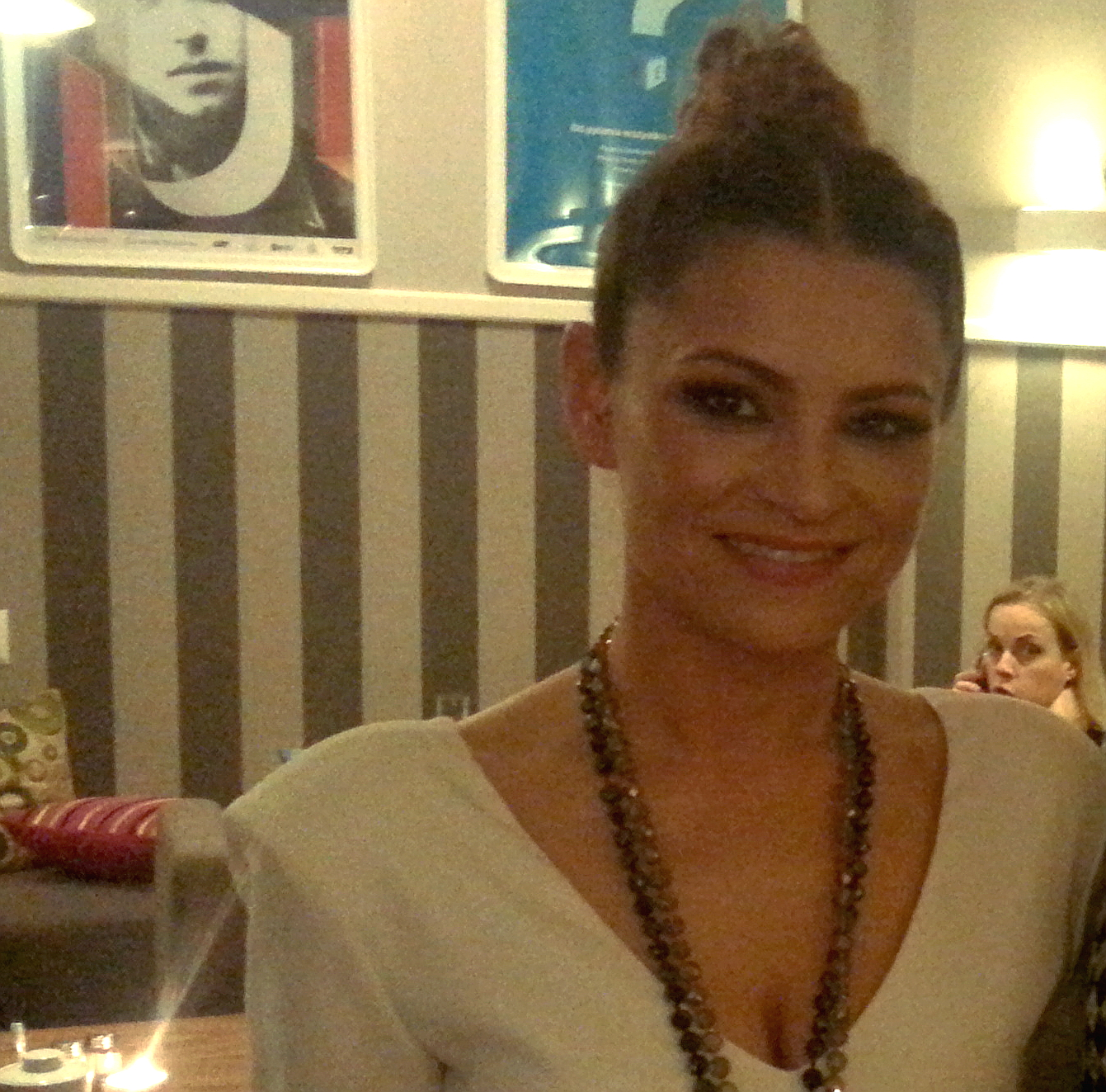 Polska piosenkarka Anna Szarmach w 2014 roku.